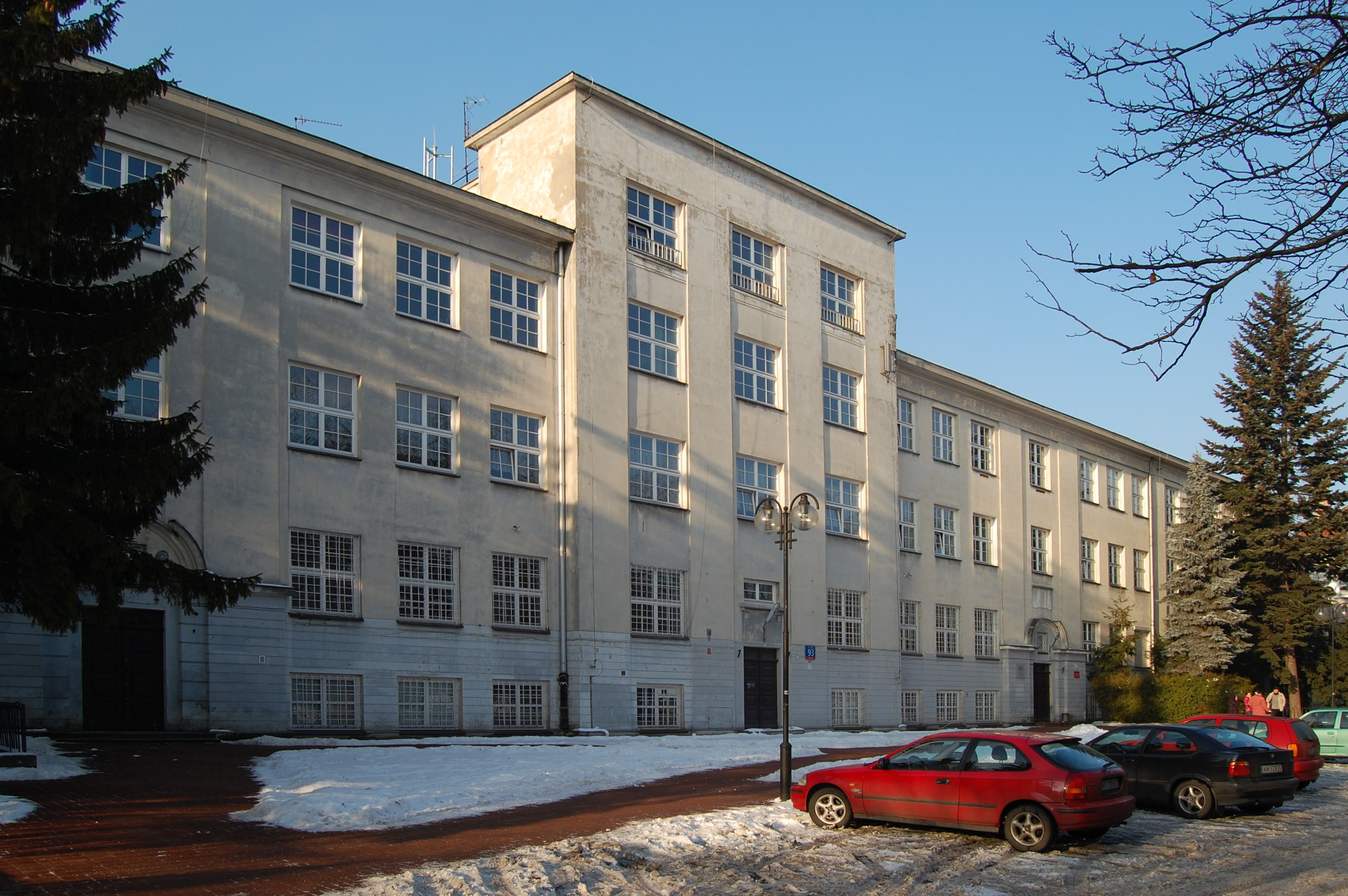 Budynek liceum im. Hugona Kołłątaja (Grójecka 93) — zdjęcie wykonane od strony ulicy Metrykantów.